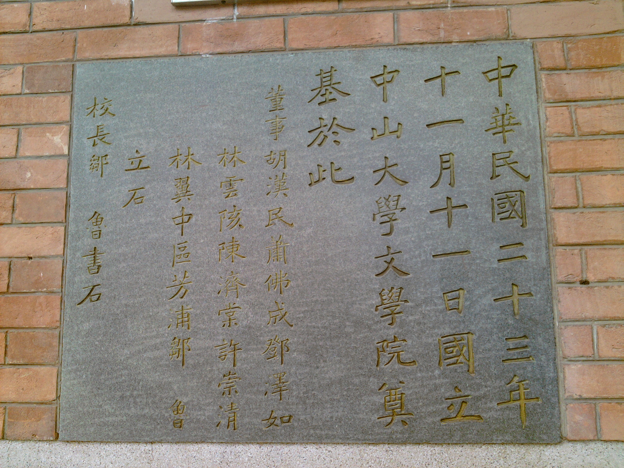 中華民國二十三年十一月十一日國立中山大學文學院奠基於此。 董事胡漢民蕭佛成鄧澤如 林雲陔陳濟棠許崇清 林翼中區芳浦鄒魯 立石 校長鄒魯書石